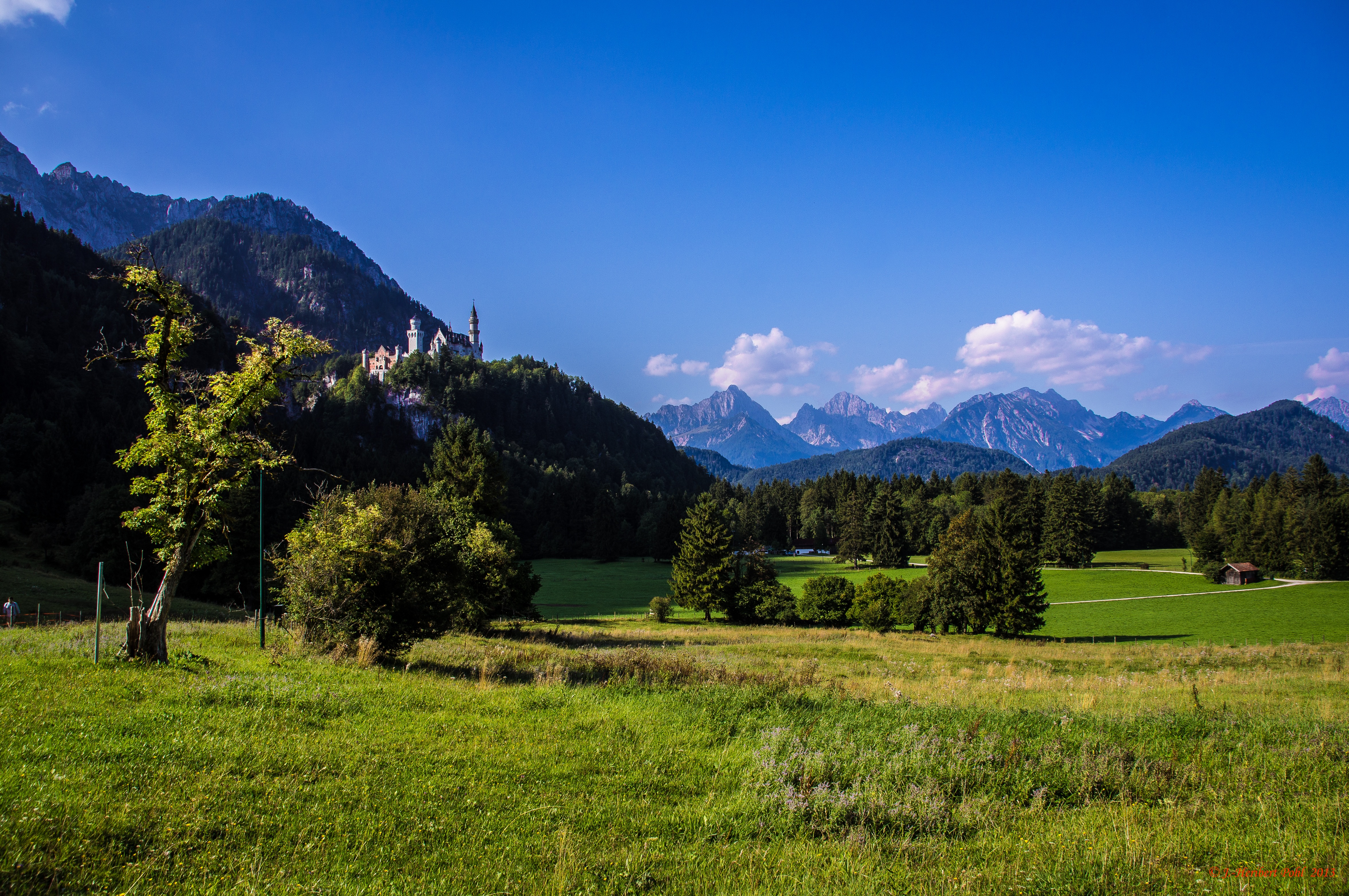 Der Schwangau bei Füssen im Allgäu mit Schloss Hohenschwanstein